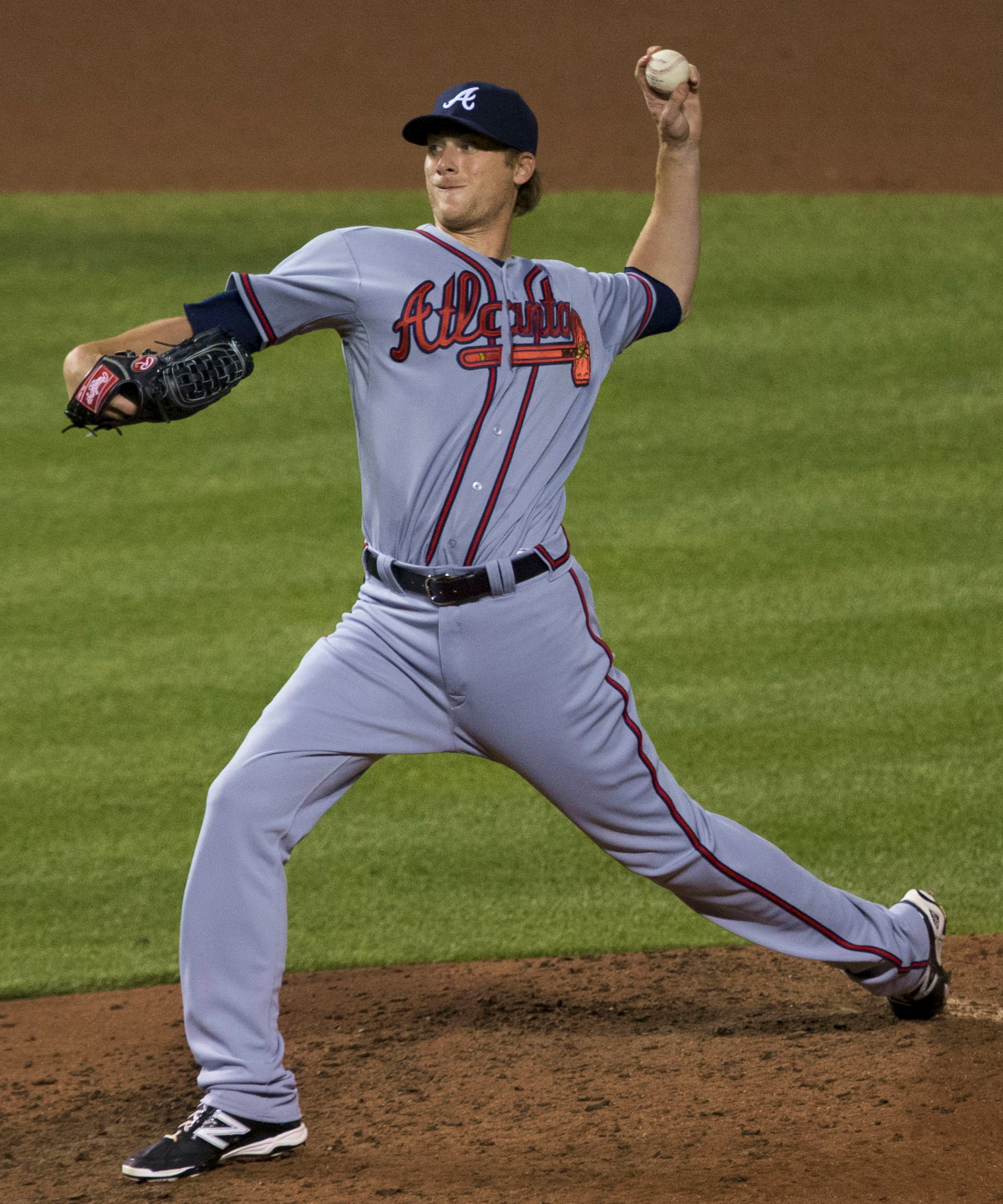 Ross Detwiler